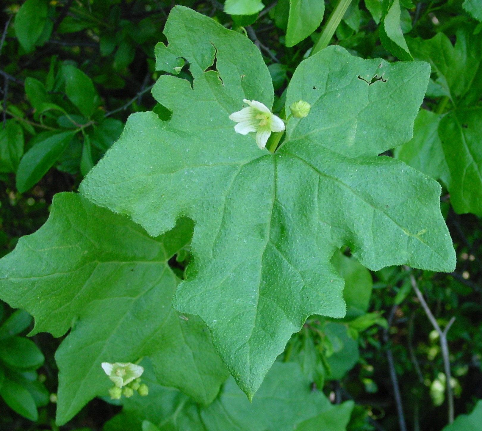 Bryonia dioica